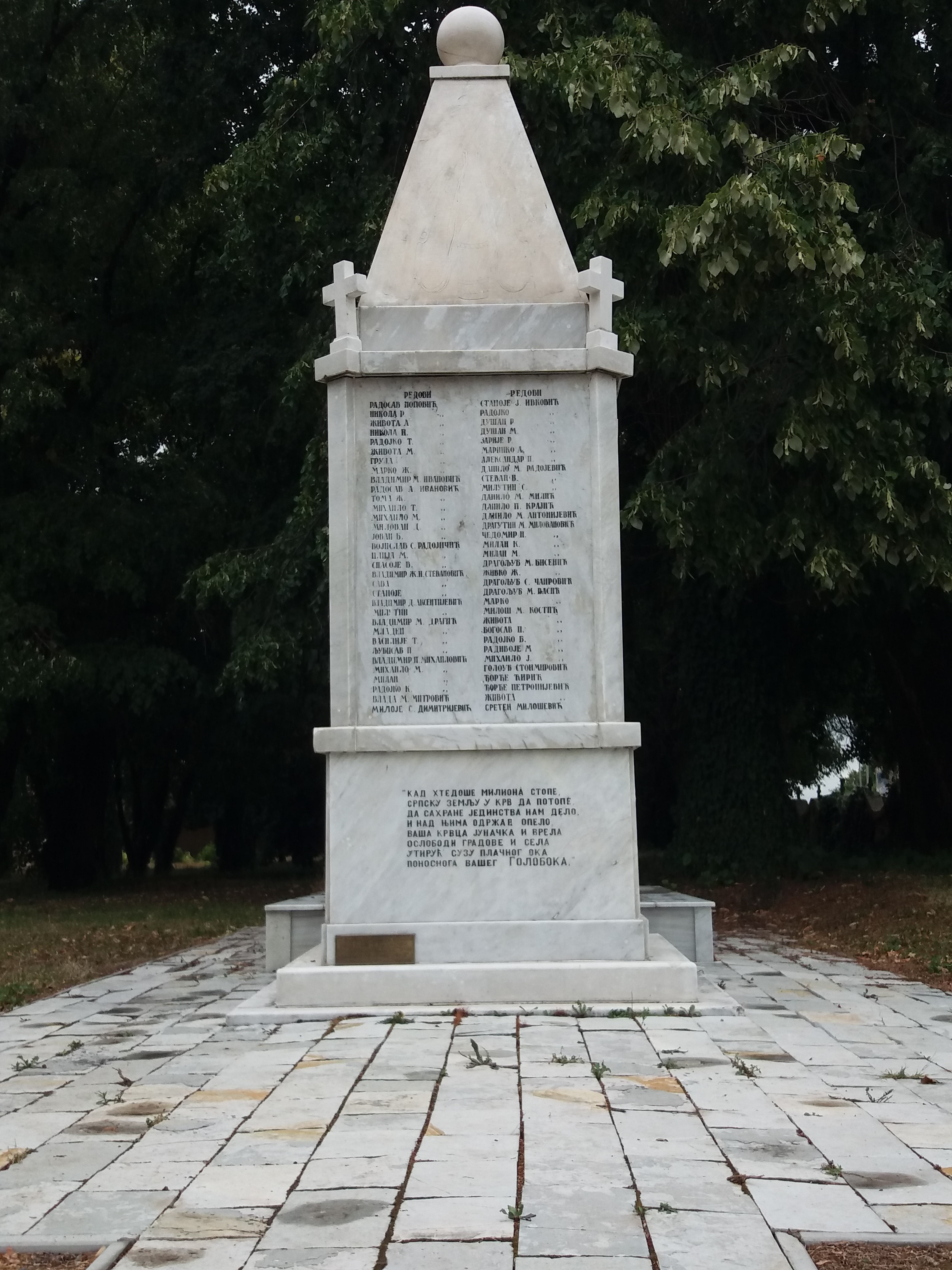 Srpski (latinica): Crkva Svetog Vaznesenja, Golobok